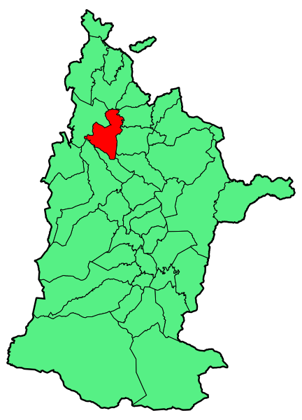 Aipaturiko udalerriaren kokapena Zuberoan